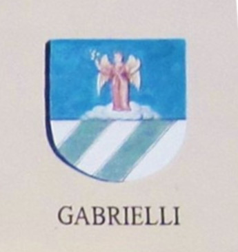 Cognomi storici dei Vicini che discendono dalle famiglie della Regola che abitavano a Predazzo e riguardano 19 cognomi: Boninsegna, Bonora, Bosin, Brigadoi, Defrancesco, Degaudenz, Dellagiacoma, Dellantonio, Dellasega, Demartin, Dezulian, Felicetti, Gabrielli, Giacomelli, Guadagnini, Morandini, Nicolao, Piazzi e Zanna.